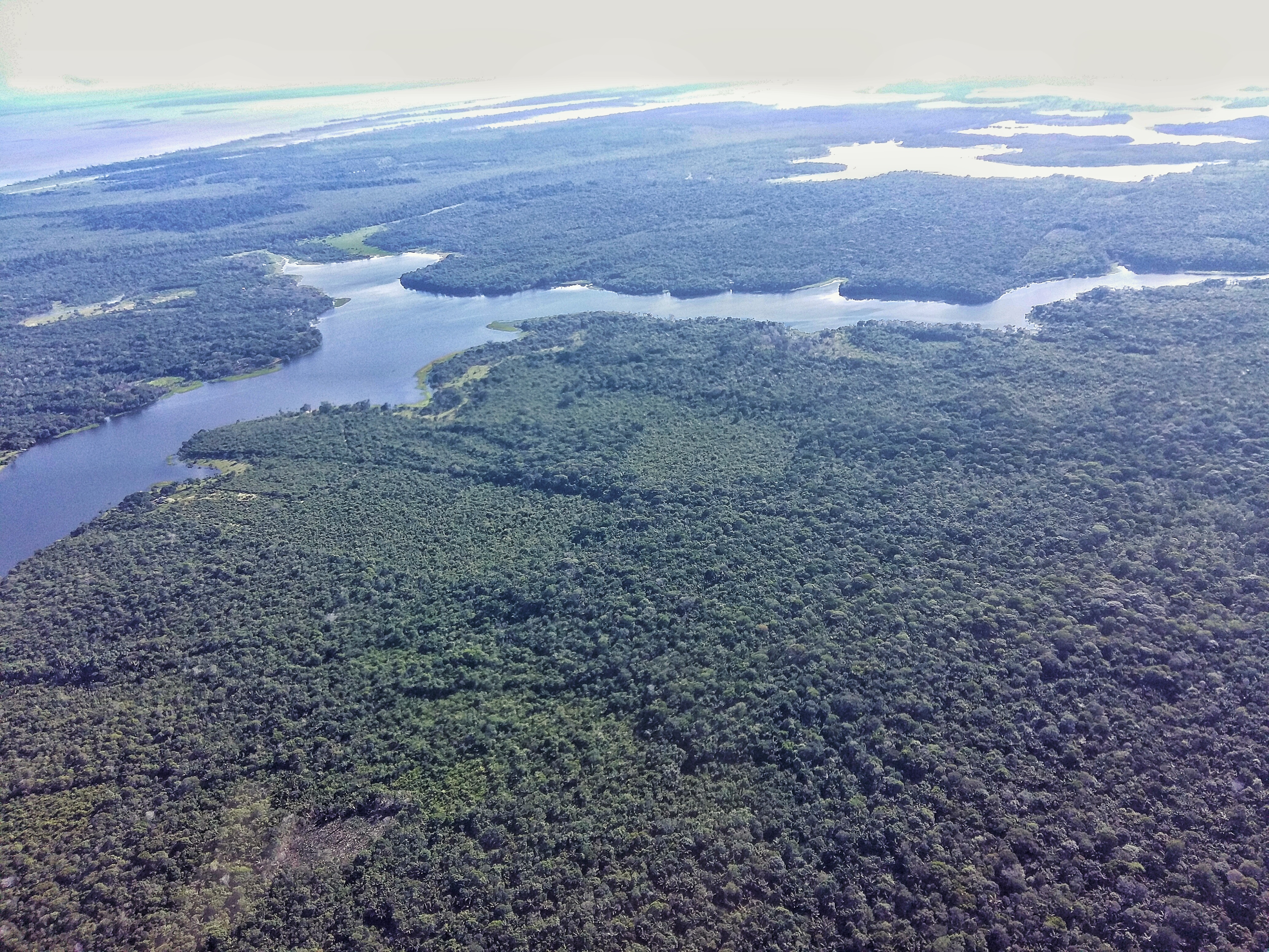 Lago do Jará, situado no município de Juruti -PA, patrimônio natural. Foto aérea.